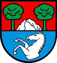 Wappen von Lüterswil-Gächliwil Kanton Solothurn Schweiz